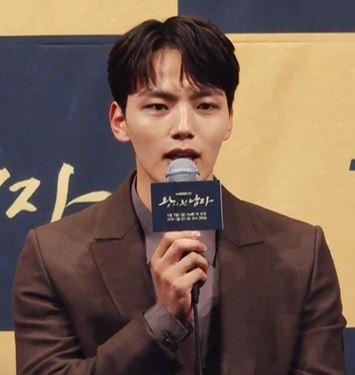 3일 오후 서울 논현동 임피리얼팰리스 호텔에서는 tvN 새 월화드라마 '왕이 된 남자'(극본 김선덕 신하은, 연출 김희원) 제작발표회가 열렸다.